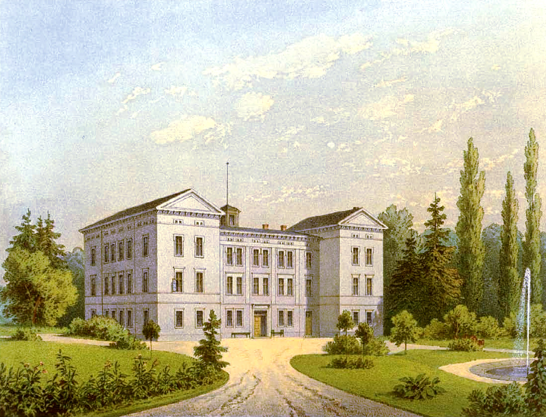 Schloss Berthelsdorf (Alt Bertelsdorf), Kreis Lauban, Provinz Schlesien, Lithografie aus dem 19. Jahrhundert